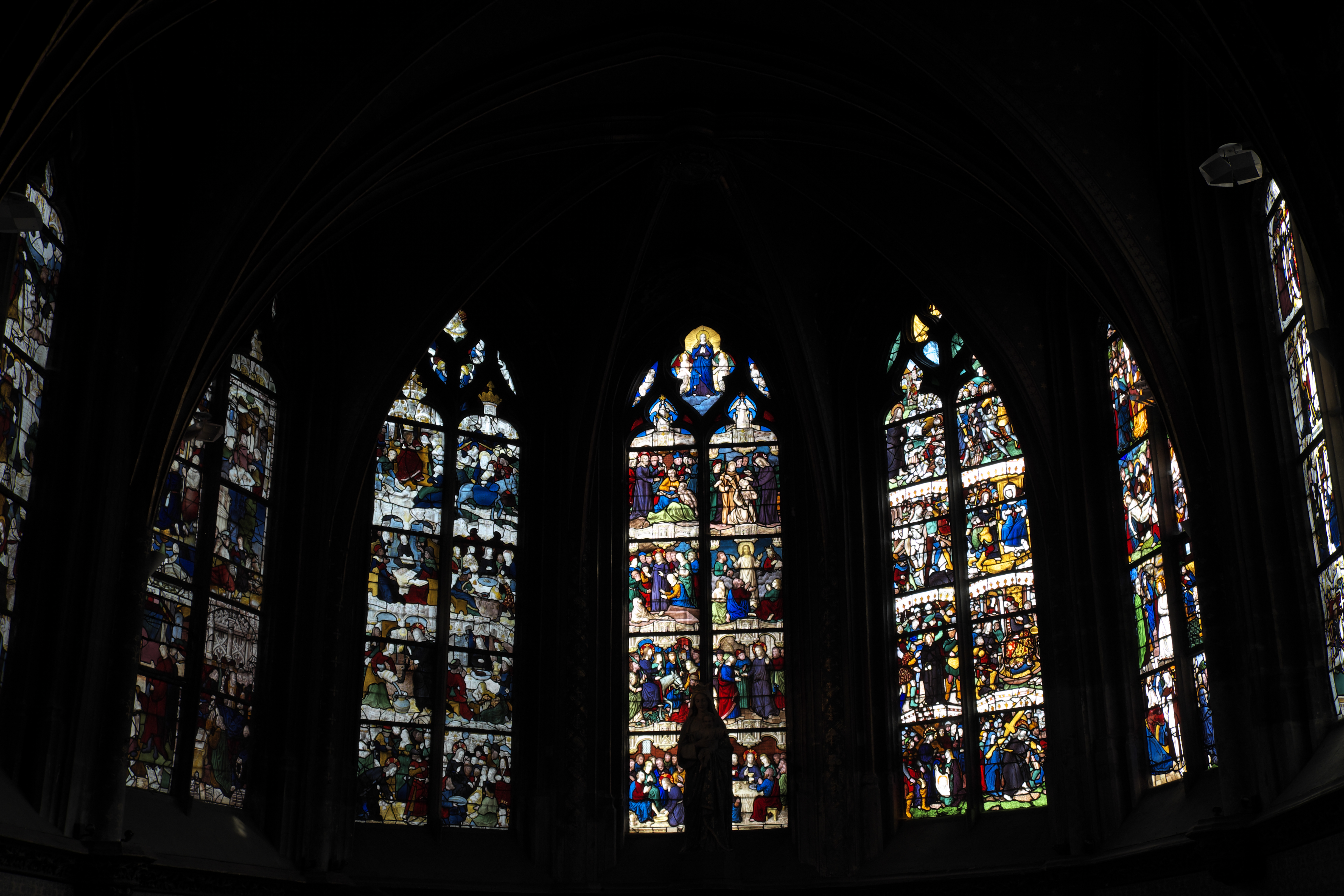 Katholische Kirche Saint-Pierre in Dreux im Département Eure-et-Loir (Centre-Val de Loire/Frankreich), Bleiglasfenster im Chor